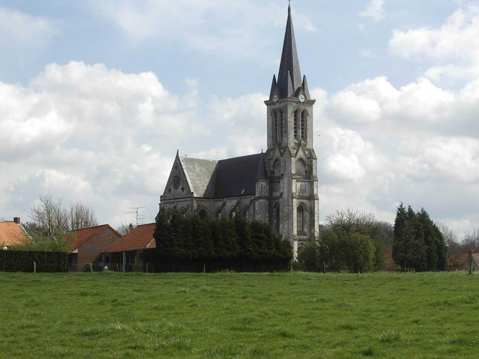 Eglise de Bouvines